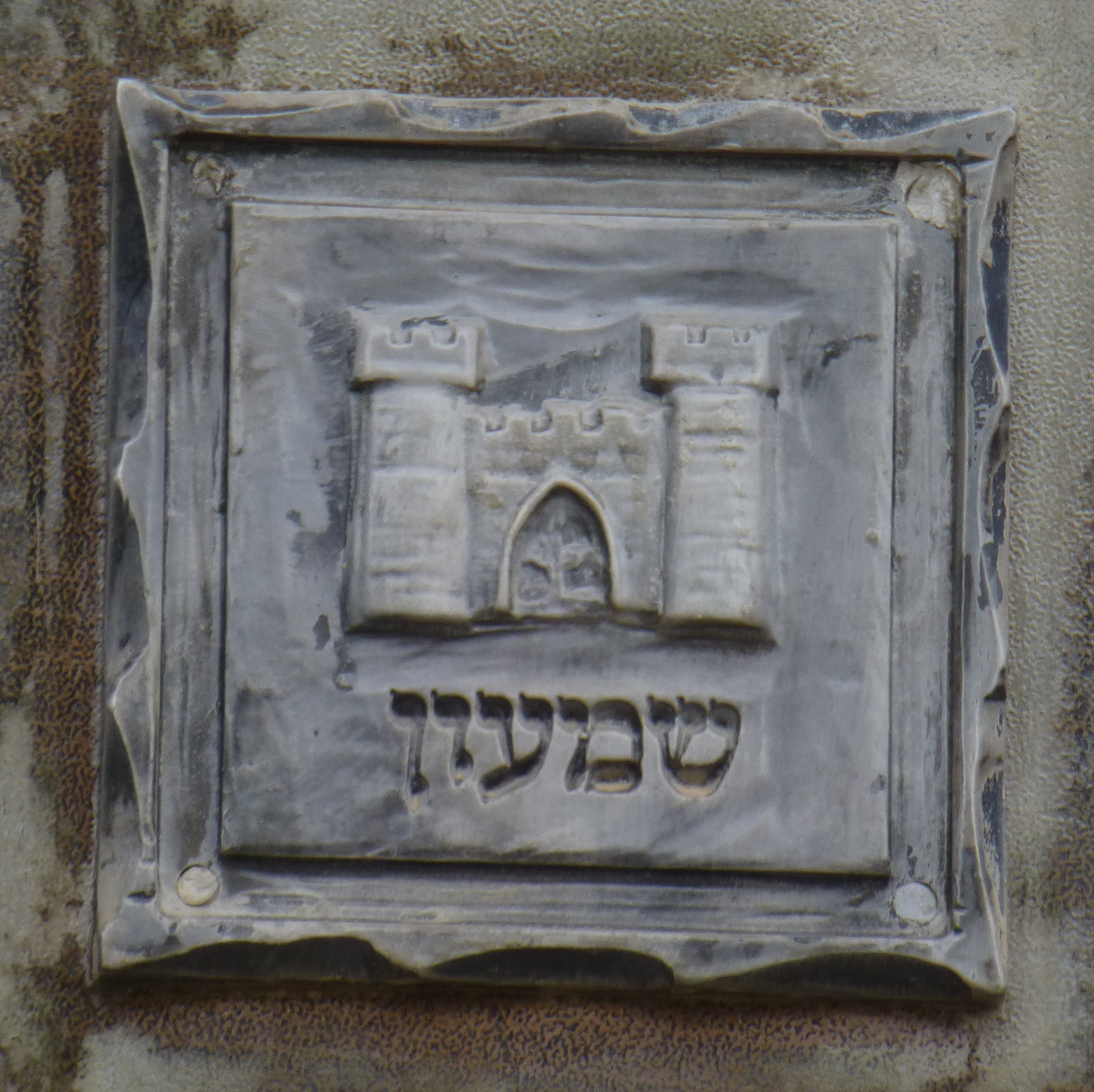 בית הכנסת הגדול "אוהל שרה" - בית הכנסת הראשון של רחובות, נבנה בשנת תרס"ד? ובהמשך שופץ והורחב והיה למוקד הקהילתי והחברתי של המושבה הצעירה.